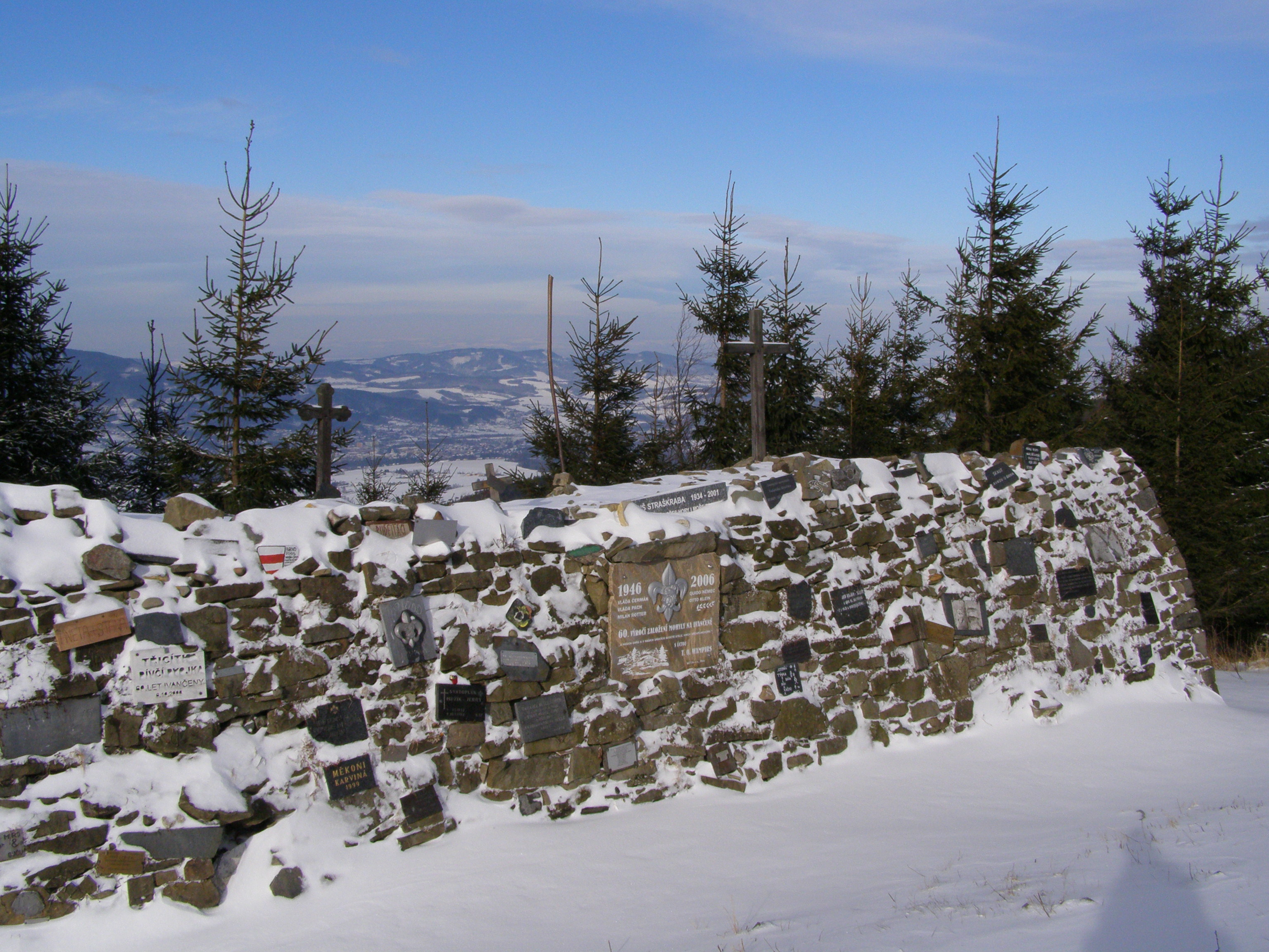 Moravskoslezské Beskydy, památník na Ivančeně